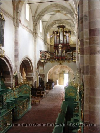 Chór muzyczny